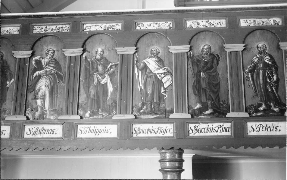 Läktarbröstning, 1700-talet. Efter behandling. Kategori: (02) Interiörer, detaljerLäktarbröstning, 1700-talet. Efter behandling.